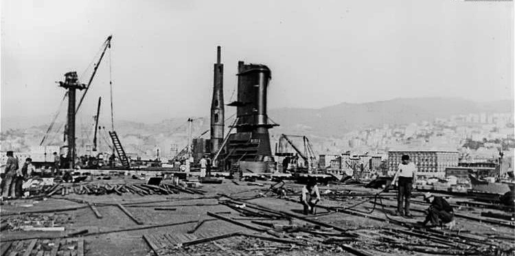 La portaerei Aquila nel Porto di Genova durante la realizzazione del ponte di volo in una foto del Consorzio Autonomo del Porto di Genova della Collezione Giorgio Parodi